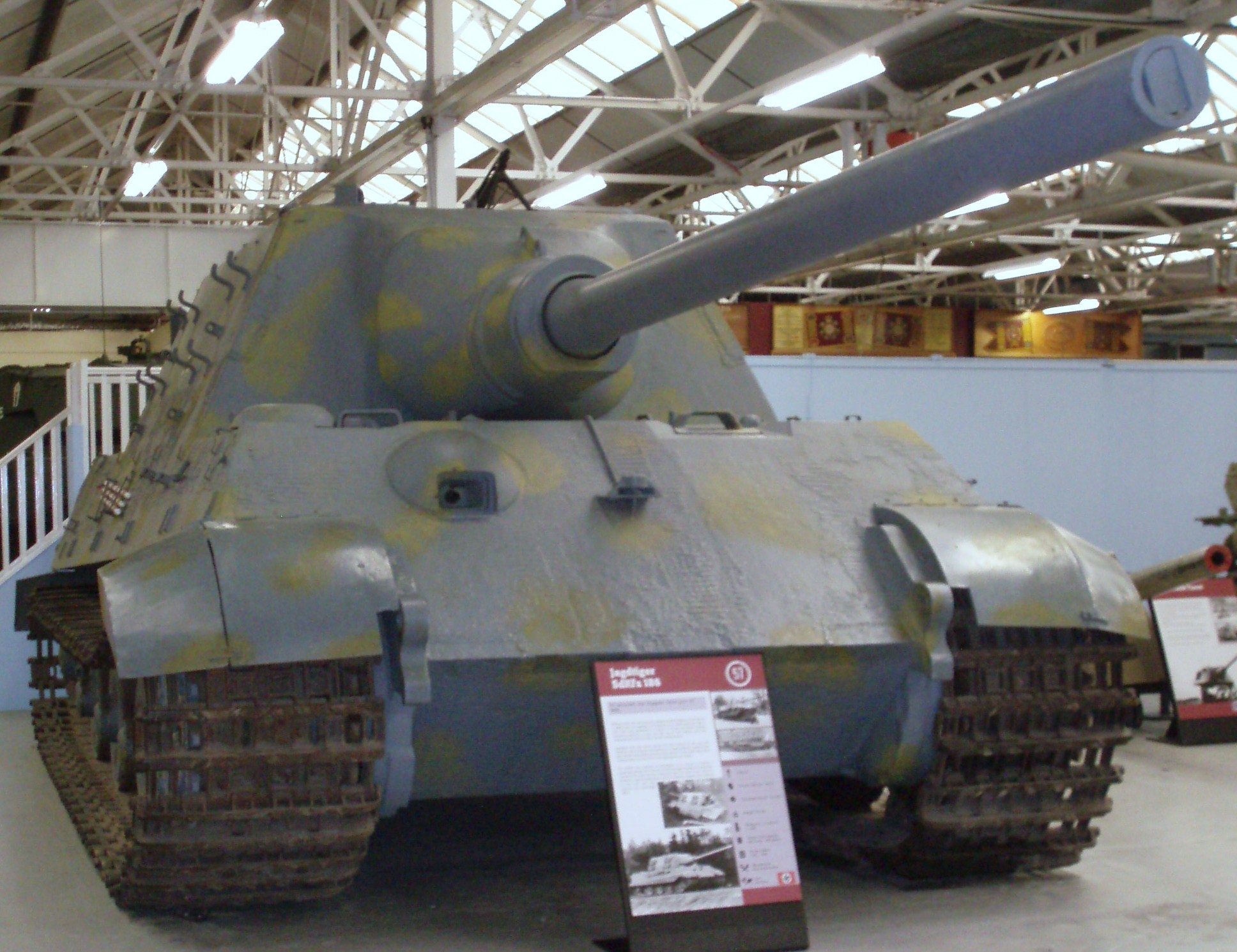 Bovington Tank Museum 262 Jagdtiger sdkfz 186